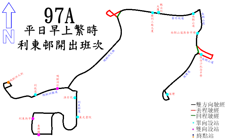 中文（香港）: 城巴97A線(只適用於平日早上尖峰時間)的走線圖